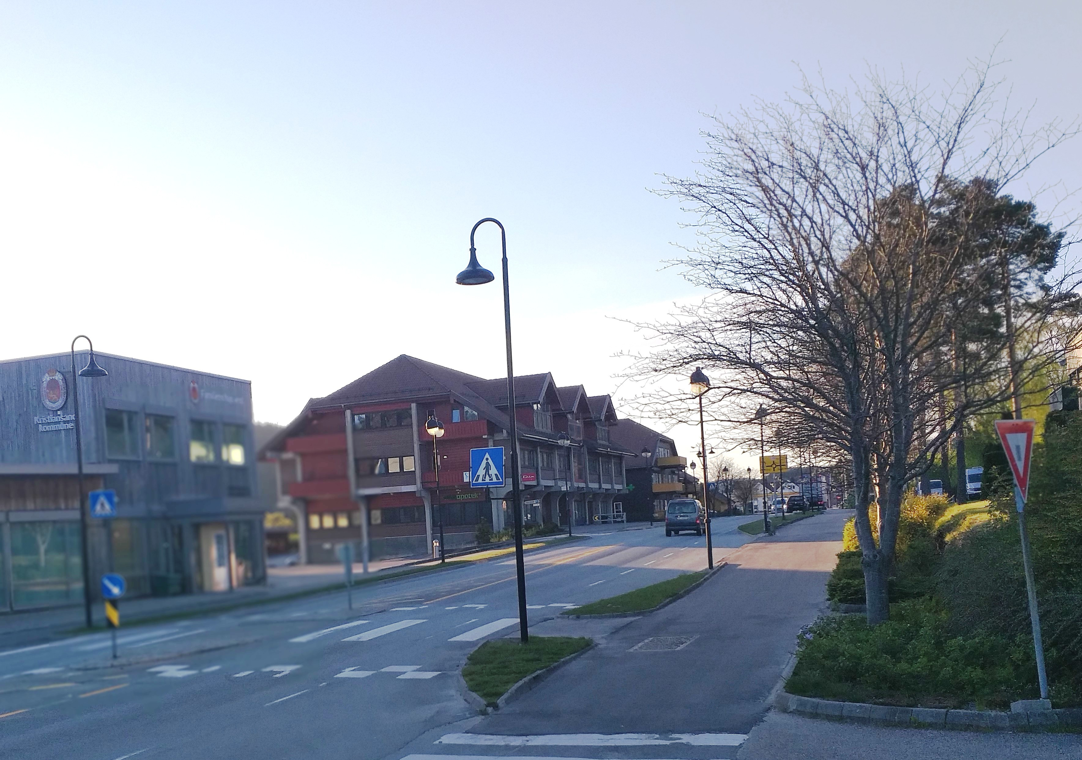 Sentrum av Nodeland